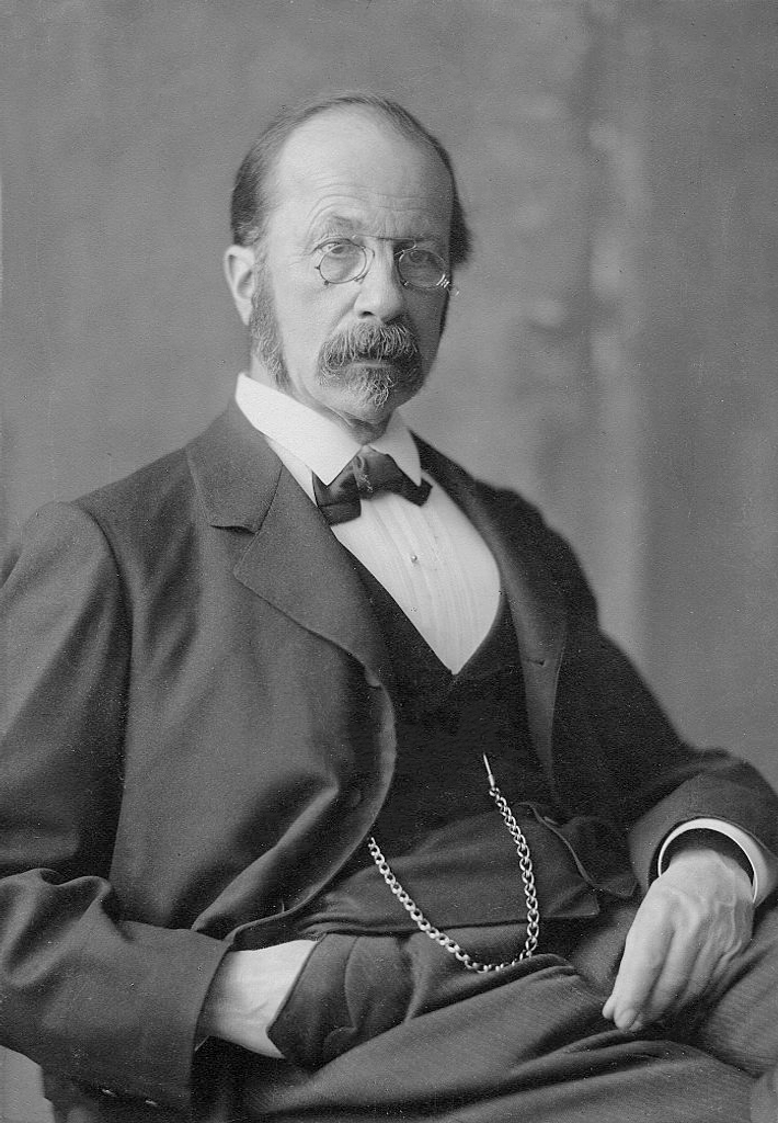 Wilhelm His sr, c. 1900. Er war ein Schweizer Anatom.